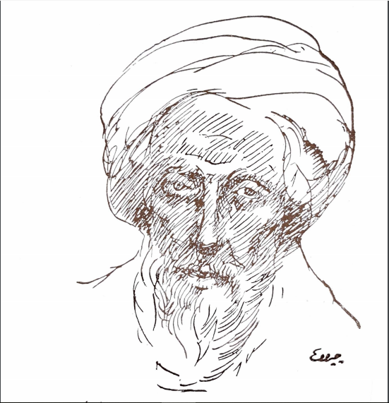 رسمٌ تخيُليّ لابن الفارض بِريشة جُبران خليل جُبران.